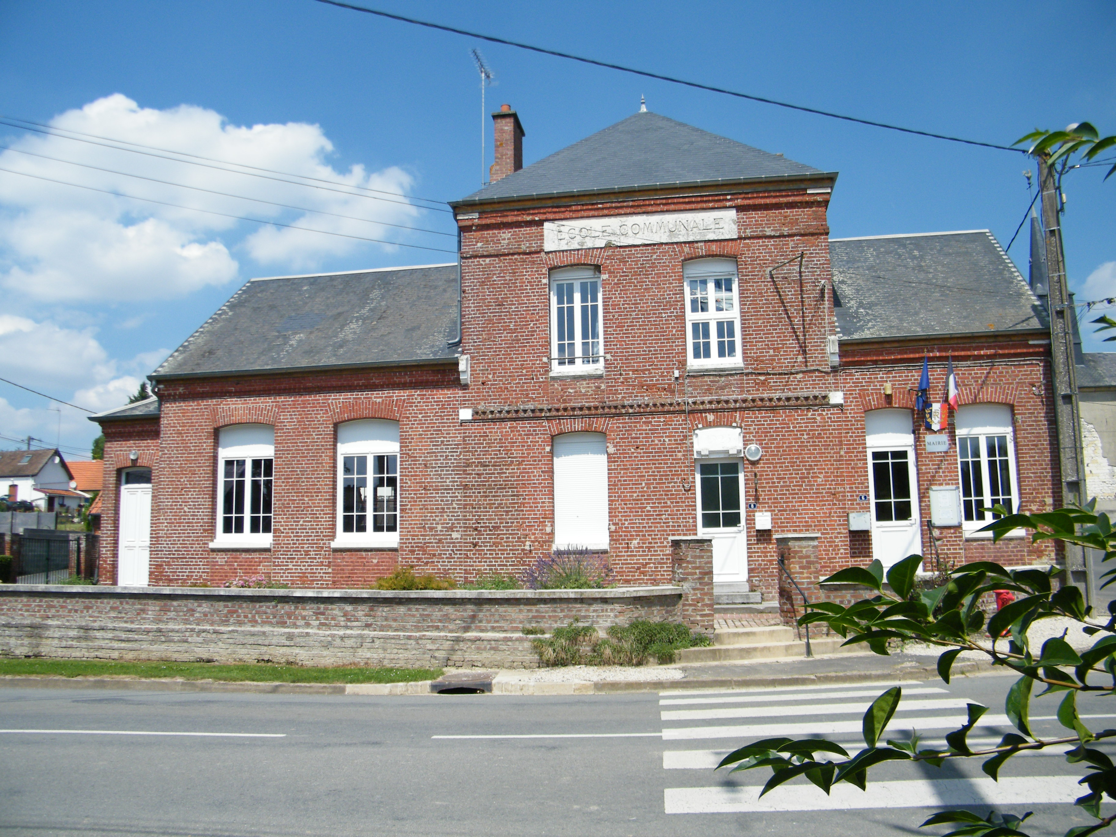 Mairie-école.